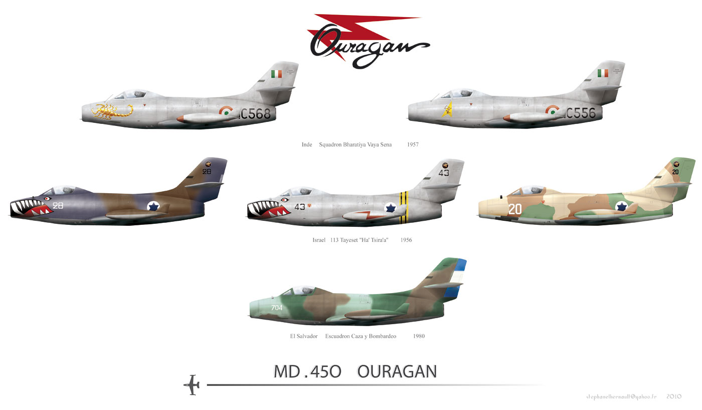 Avions Marcel Dassault MD 450 Ouragan Utilisateurs étrangers Inde El Salvador Israel